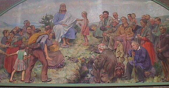 Heinrich Pforr, Die Bergpredigt, St. Matthäus, Hann. Münden, Germany, 1999-04-26